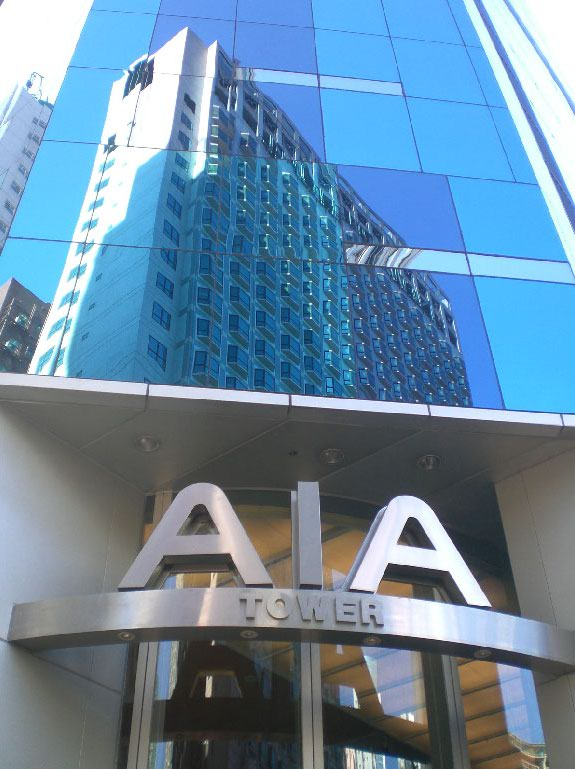 北角zh:炮台山油街zh:友邦廣場 & 香港麗東酒店